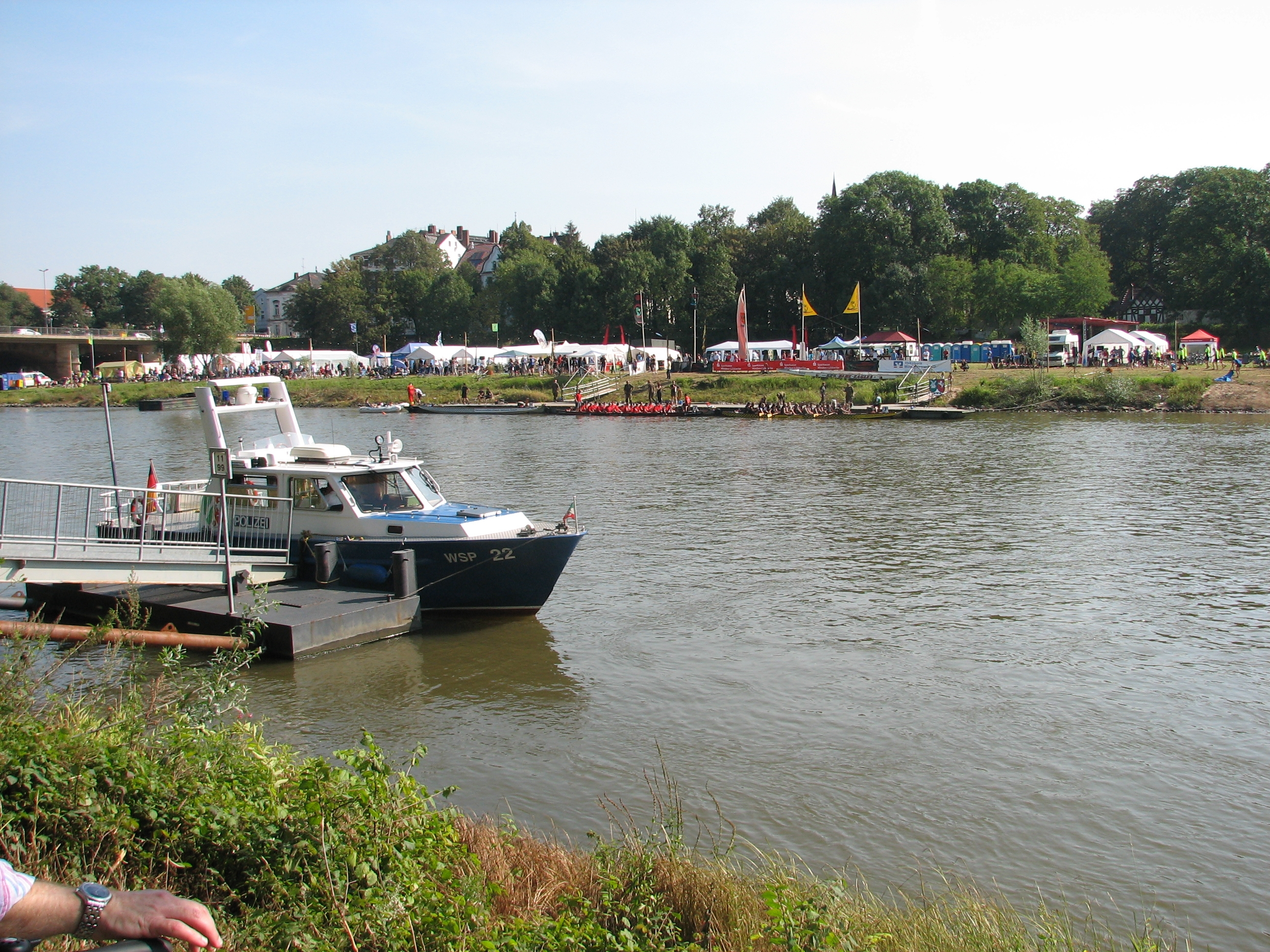 Zieleinlauf beim Blauen Band der Weser 2011 auf der Weserwiese am rechten Weserufer in Minden